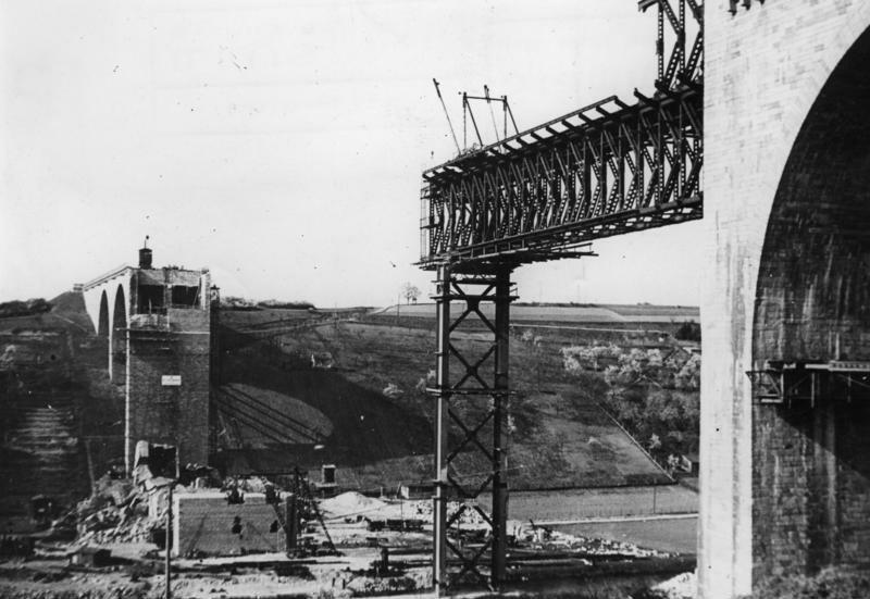 Bei Limburg, Wiederaufbau Autobahnbrücke Wiederaufbau der Limburger Autobahnbrücke Deutschlands höchste Autobahnbrücke, die in 60 m Höhe die Lahn bei Limburg überspannte und gegen Kriegsende zerstört wurde, wird jetzt auf den verbliebenen Betonpfeilern als Stahlkonstruktion aufgebaut, da die Wiederherstellung in der alten Form (Stein und Beton) zu kostspielig wäre. - In der Bizone wurden bis zum 15-3-49 1049 Dauer- und 1989 Behelfs-Strassenbrücken neu errichtet. 3000 Strassenbrücken sollen noch im Zuge eines Zehnjahresplanes neu erstellt werden. 22-4-49 Illus-dpd 3131-49